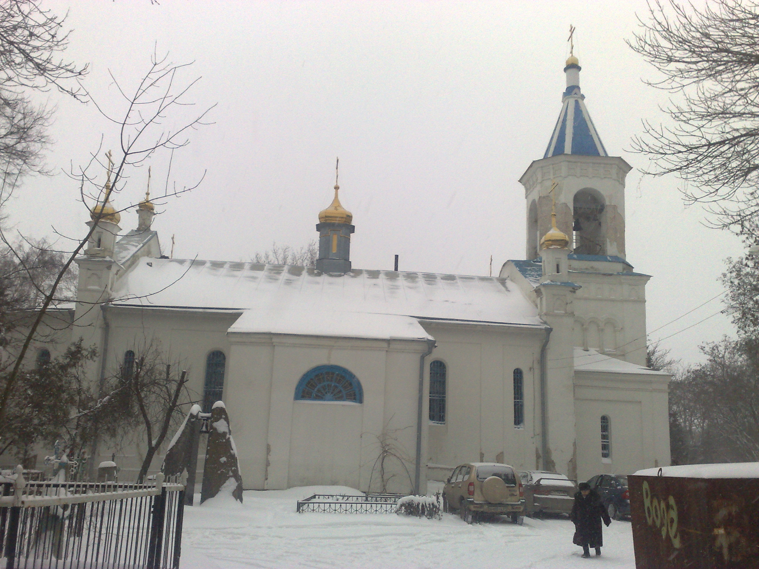 Свято-Димитриевская церковь города Новочеркасска